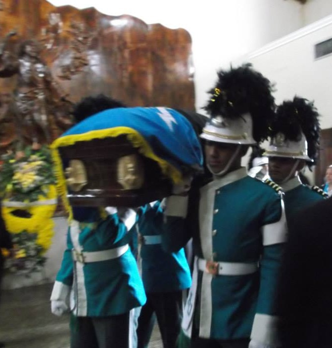 Los restos de Eduardo López Rivas entran al Panteón del Estado Zulia, para su reposo en el nicho de los ilustres. La ceremonia se efectuó en la ciudad de Maracaibo, el 24 de febrero de 2015.